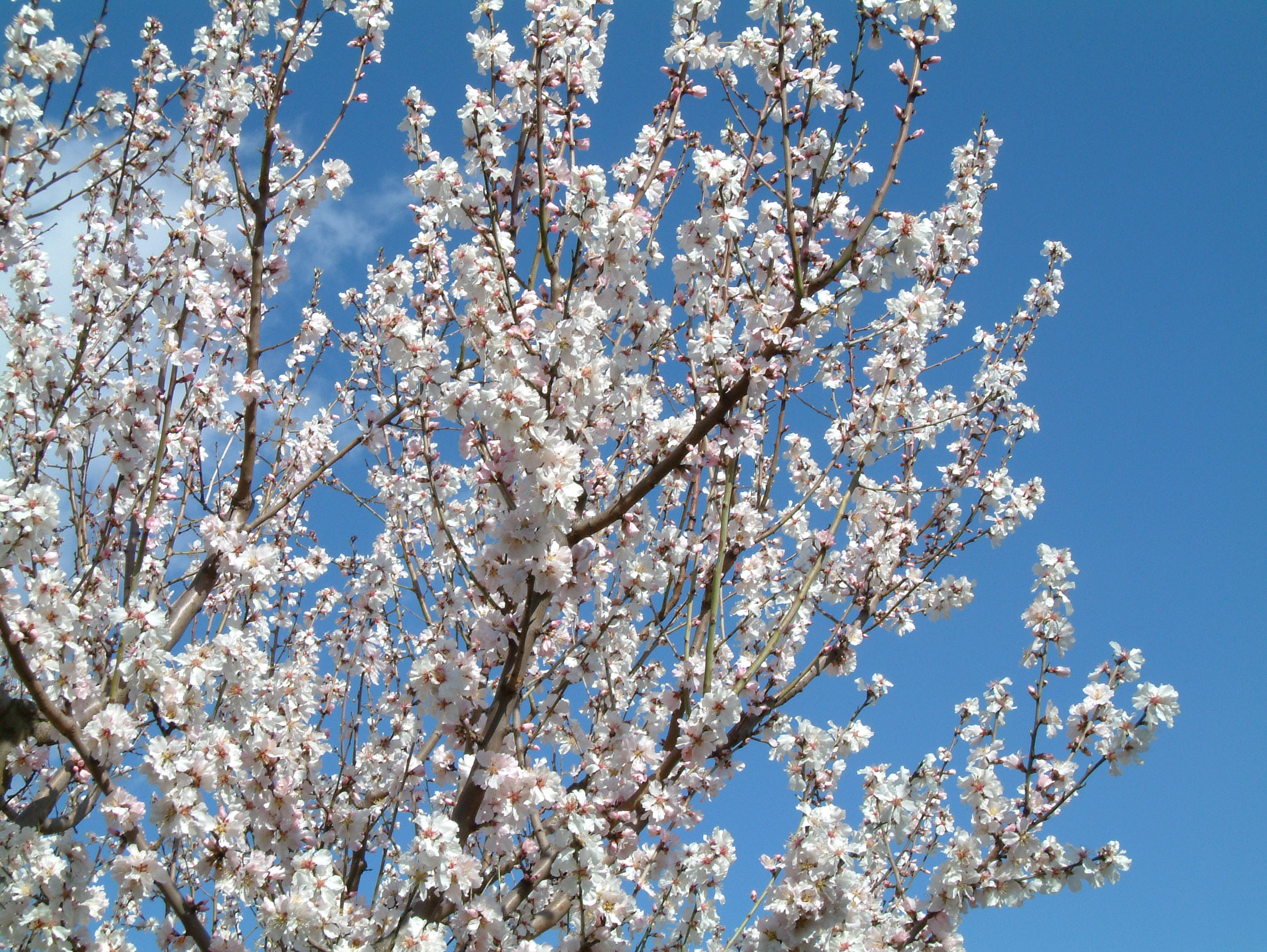 Blühender Mandelbaum zu dirmstein, selbst fotografiert am 2004-03-21 und freigegeben durch Benutzer:Mundartpoet